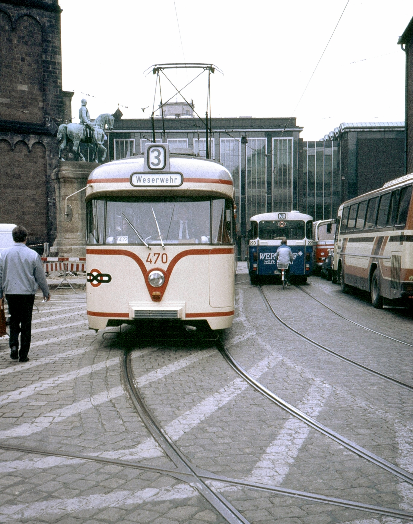 Hansa GT4 Bremen Domshof